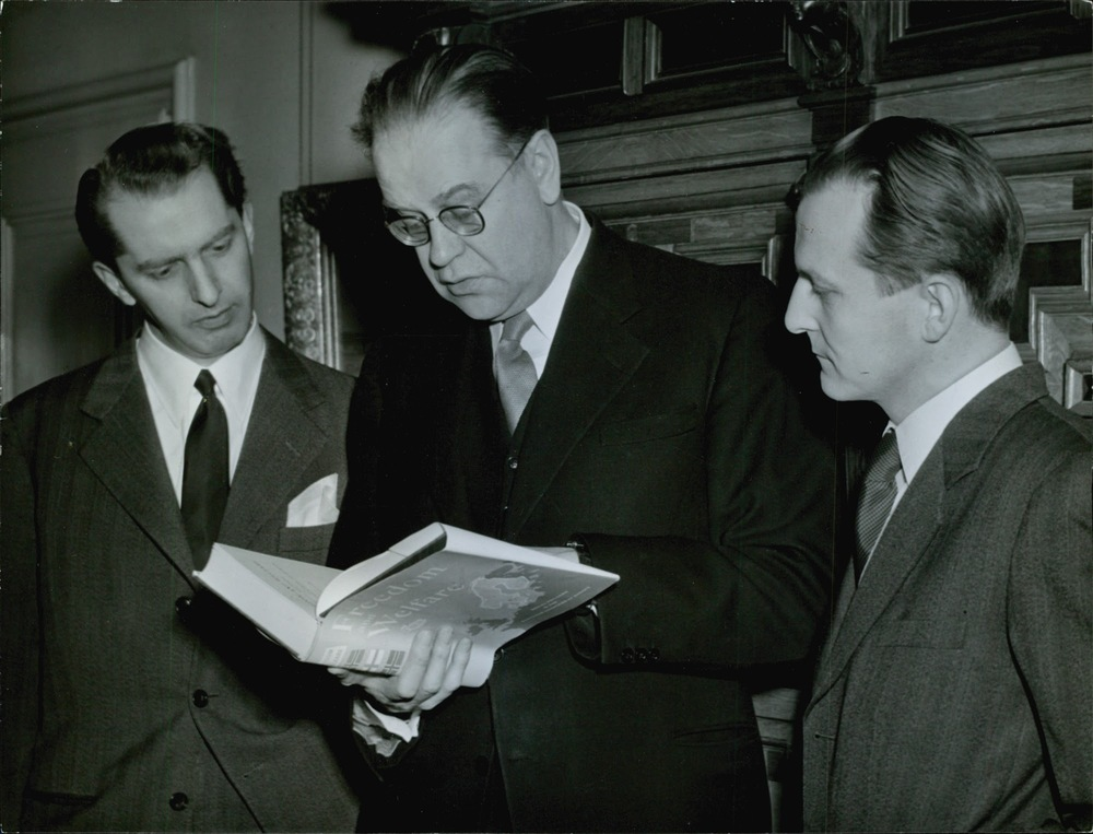 Bildtext vid publiceringen 1954: "Statsminister Tage Erlander fick på onsdagen mottaga den samnordiska boken 'Freedom and Welfare' av direktör Göran Tegner och sekreterare Ernst Michanek." Bilden infördes i Svenska Dagbladet 1954-02-18 sid 9 (